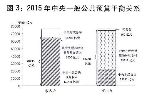 2015年3月5日《关于2014年中央和地方预算执行情况与2015年中央和地方预算草案的报告》（2015年3月15日第十二届全国人民代表大会第三次会议通过）图3